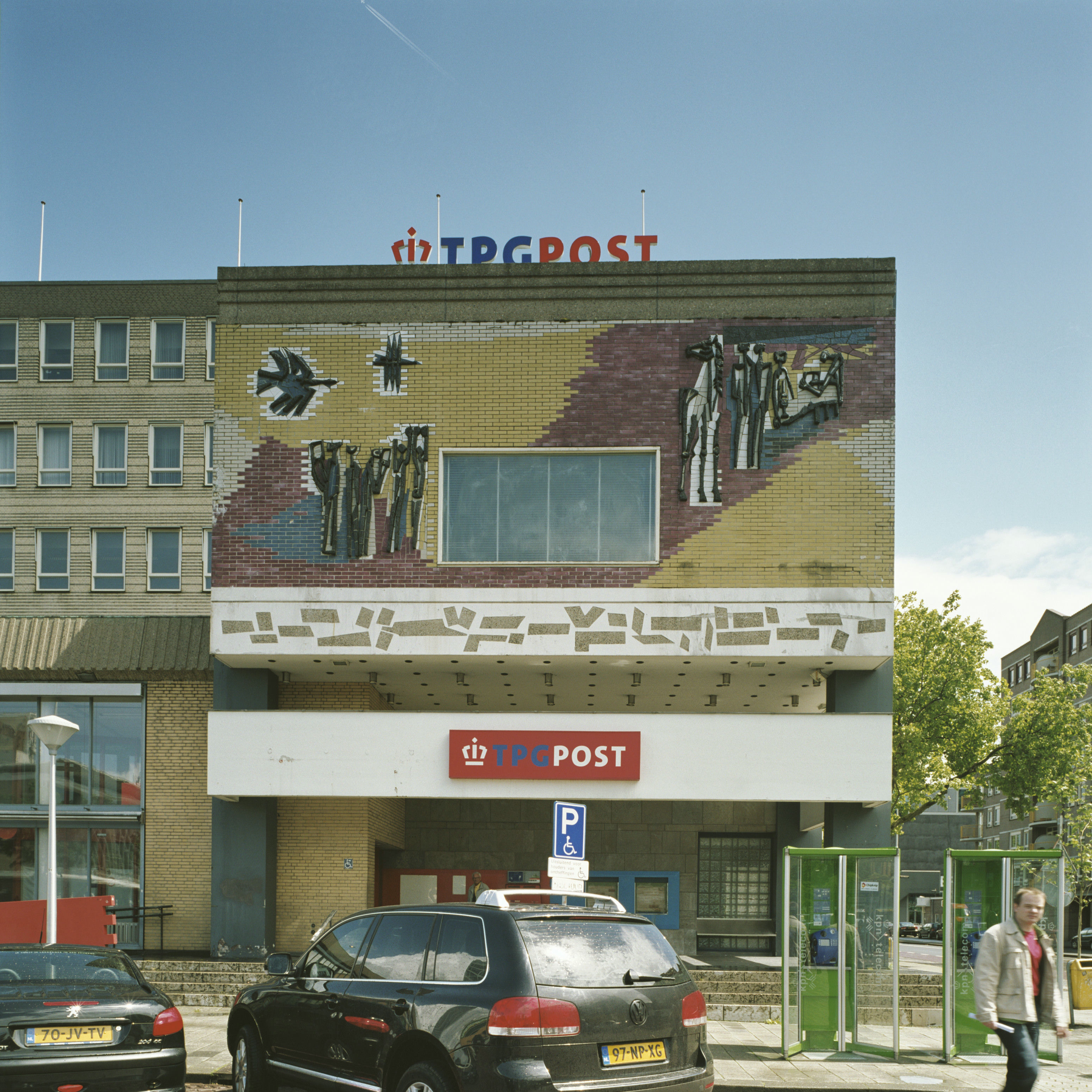 Stationspostkantoor: Voorzijde met uitbouw en entree met kunstwerk van Wally Elenbaas, van gekleurd metselwerk met keramiek. Begin 2015 gesloopt.